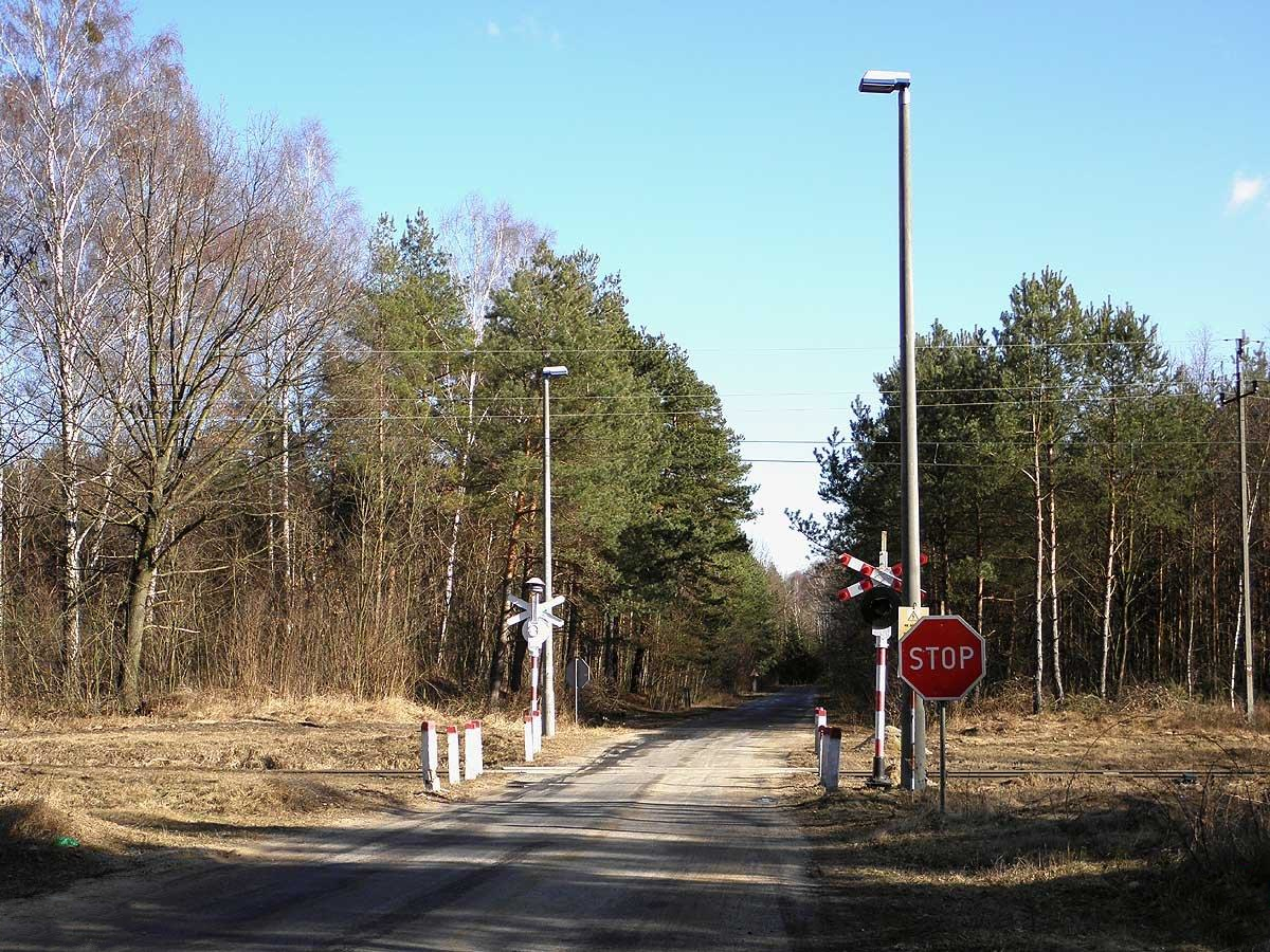 Przejazd przez linię kolejową nr 8, droga Bierwce - Ług.